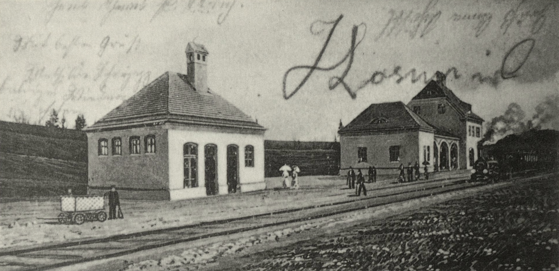 Haltestelle Seefeld-Hechendorf kurz nach der Erbauung auf einer Postkarte von 1903. Links das eingeschossige Nebengebäude, rechts das Empfangsgebäude und ein dampflokbespannter Personenzug